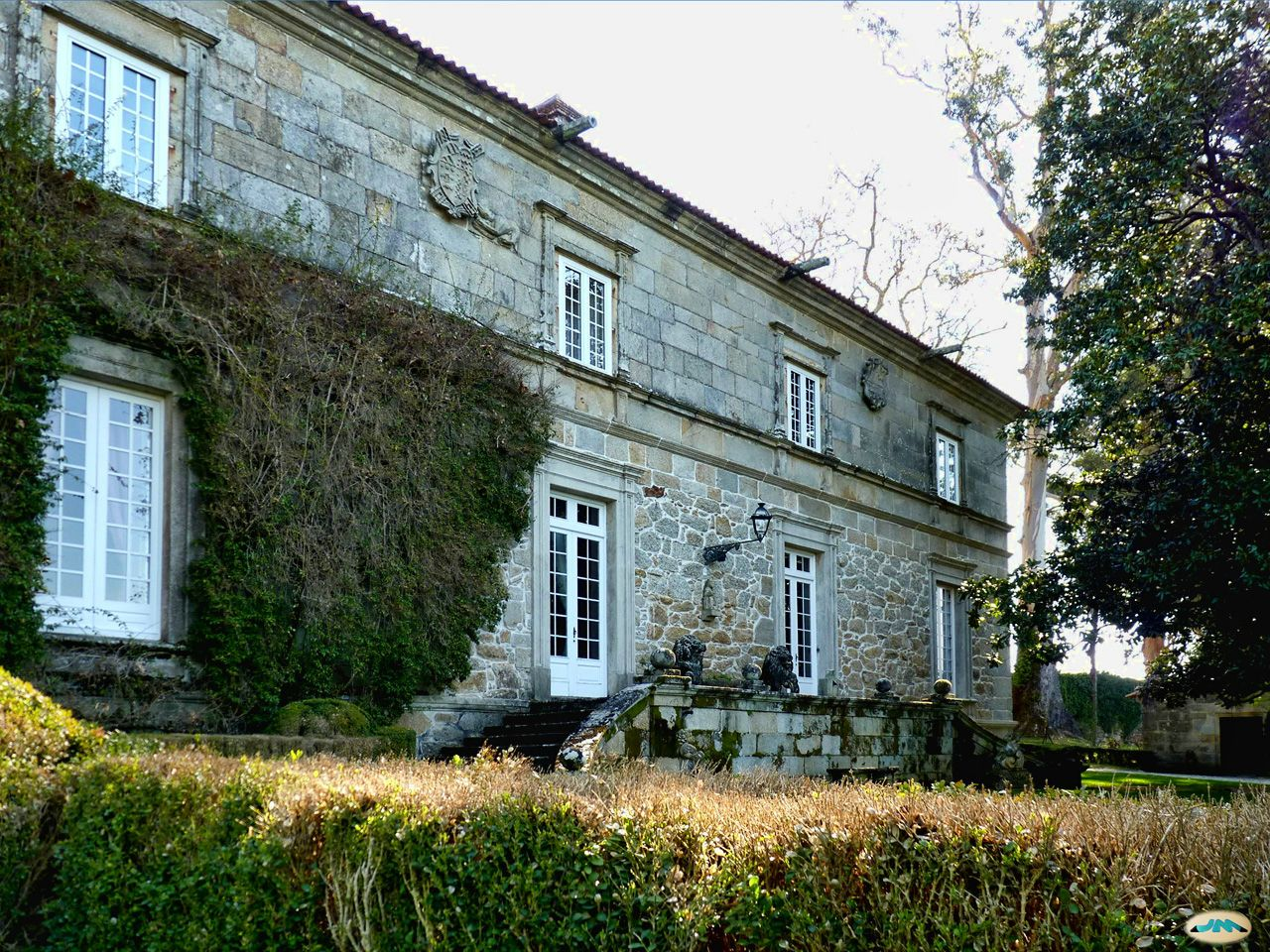 Vilagarcía de Arousa-Pazo de Rubians-Fachada principal